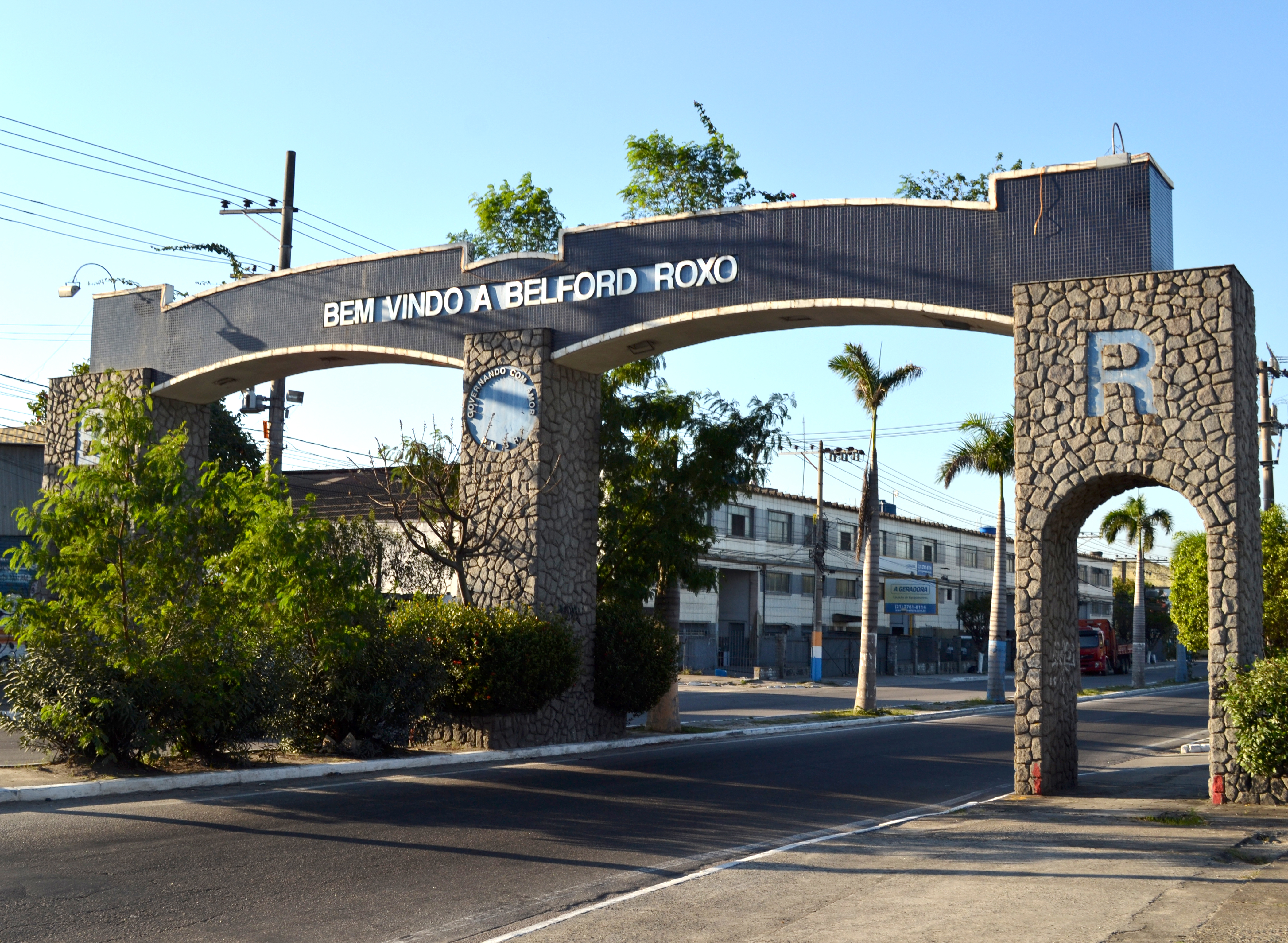 Pórtico da cidade brasileira de Belford Roxo, representa o limite entre os municípios de Belford Roxo e Mesquita (Rio de Janeiro).